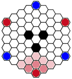 Klassische Startaufstellung bei Hexxagon, mit Zugmöglichkeiten für ein Roten Stein, die schwarzen Felder sind geblockt